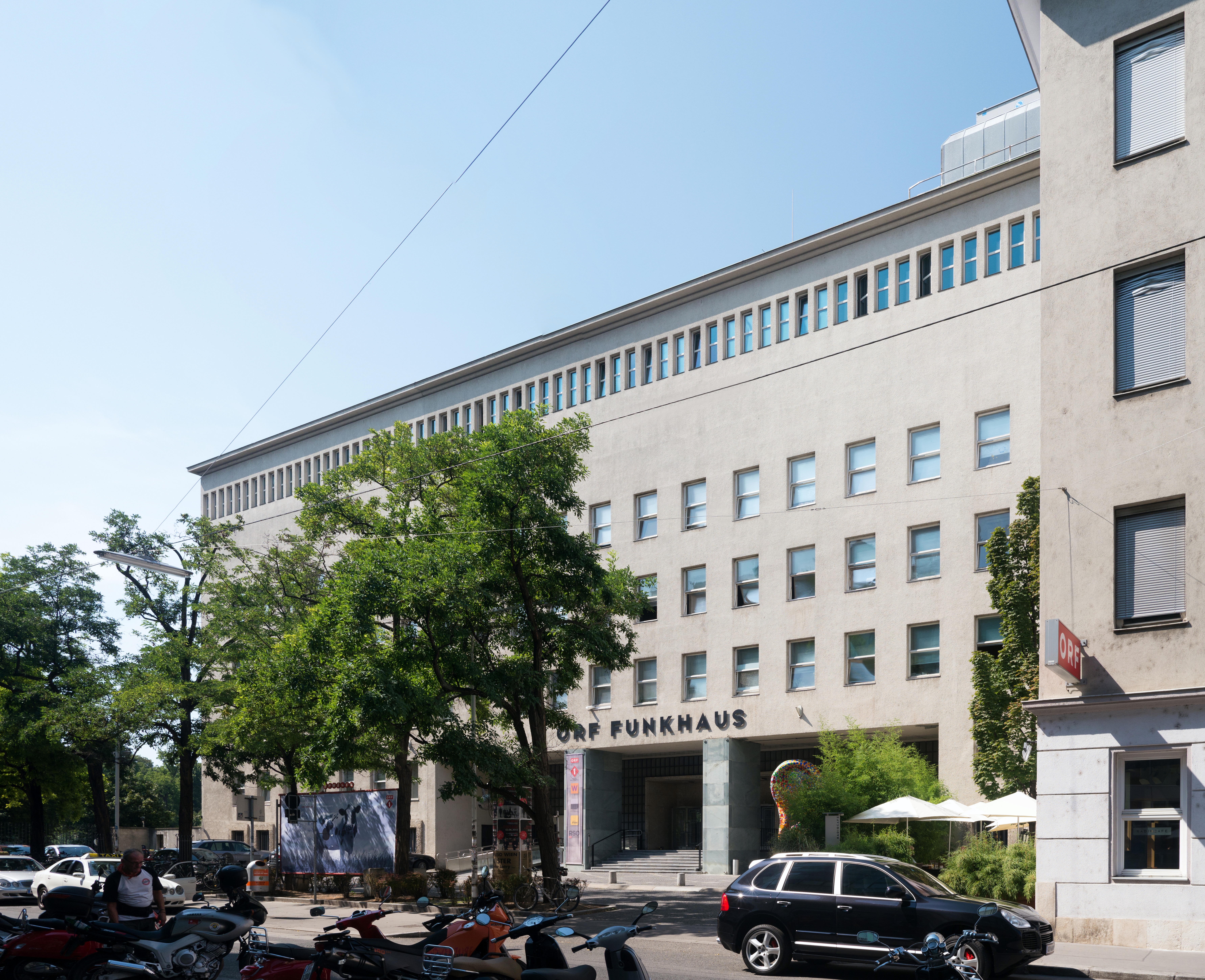 Funkhaus, ORF